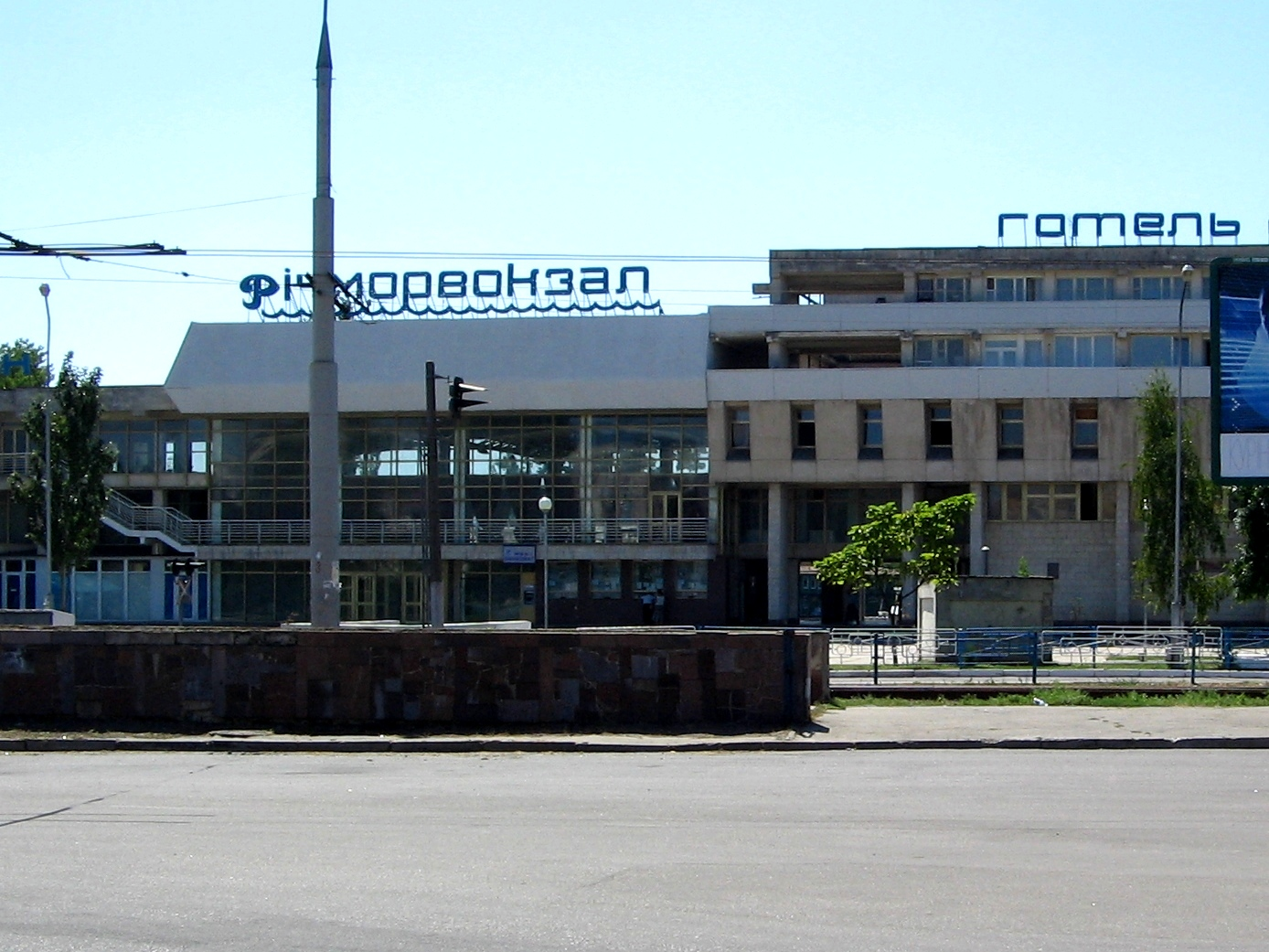 Херсонский речной вокзал